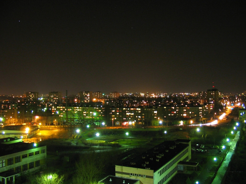 Koszalin widziany nocą. Zdjęcie wykonane z bloku w północnej części miasta.